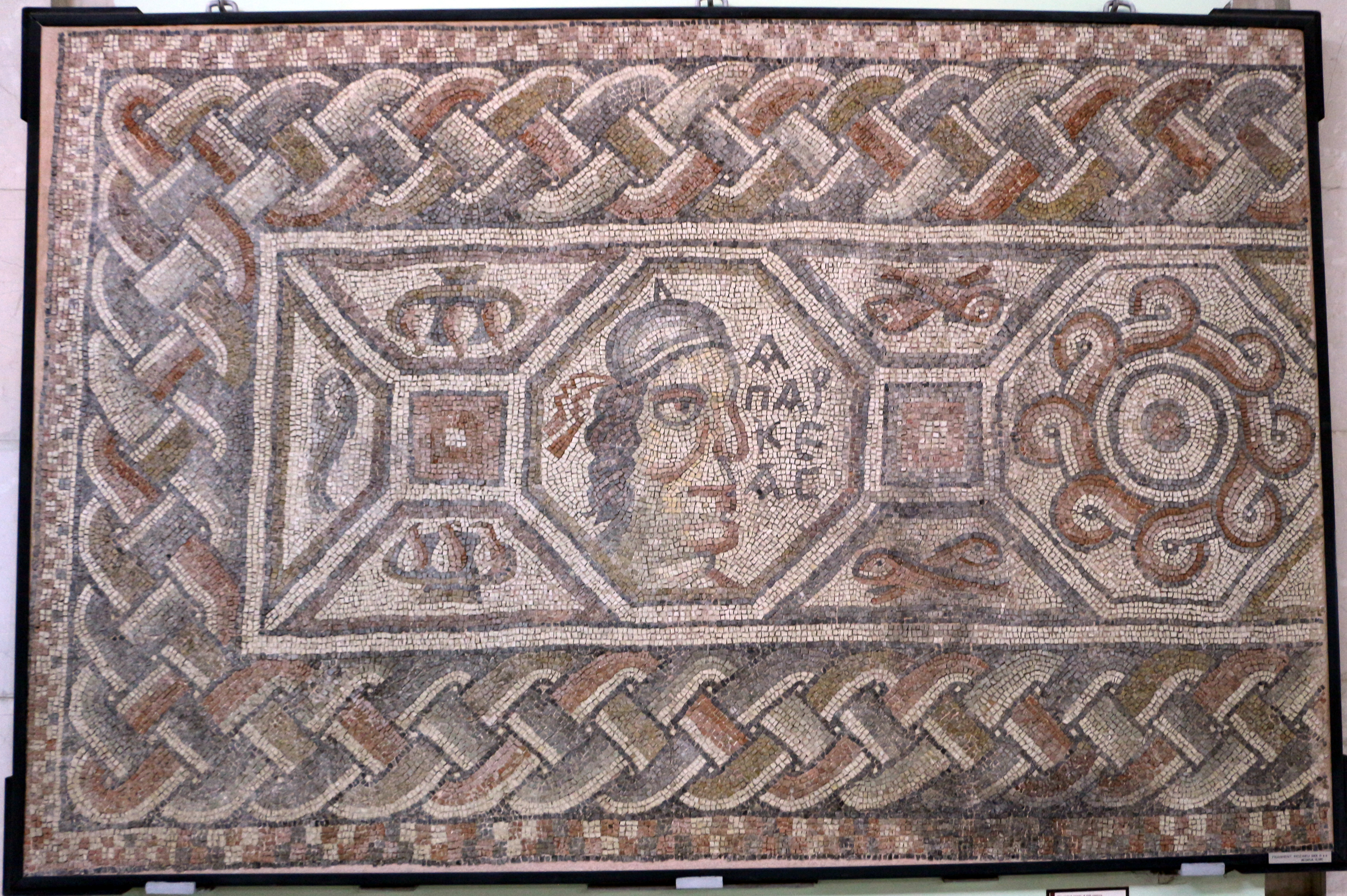 Muzeu Historik Kombëtar